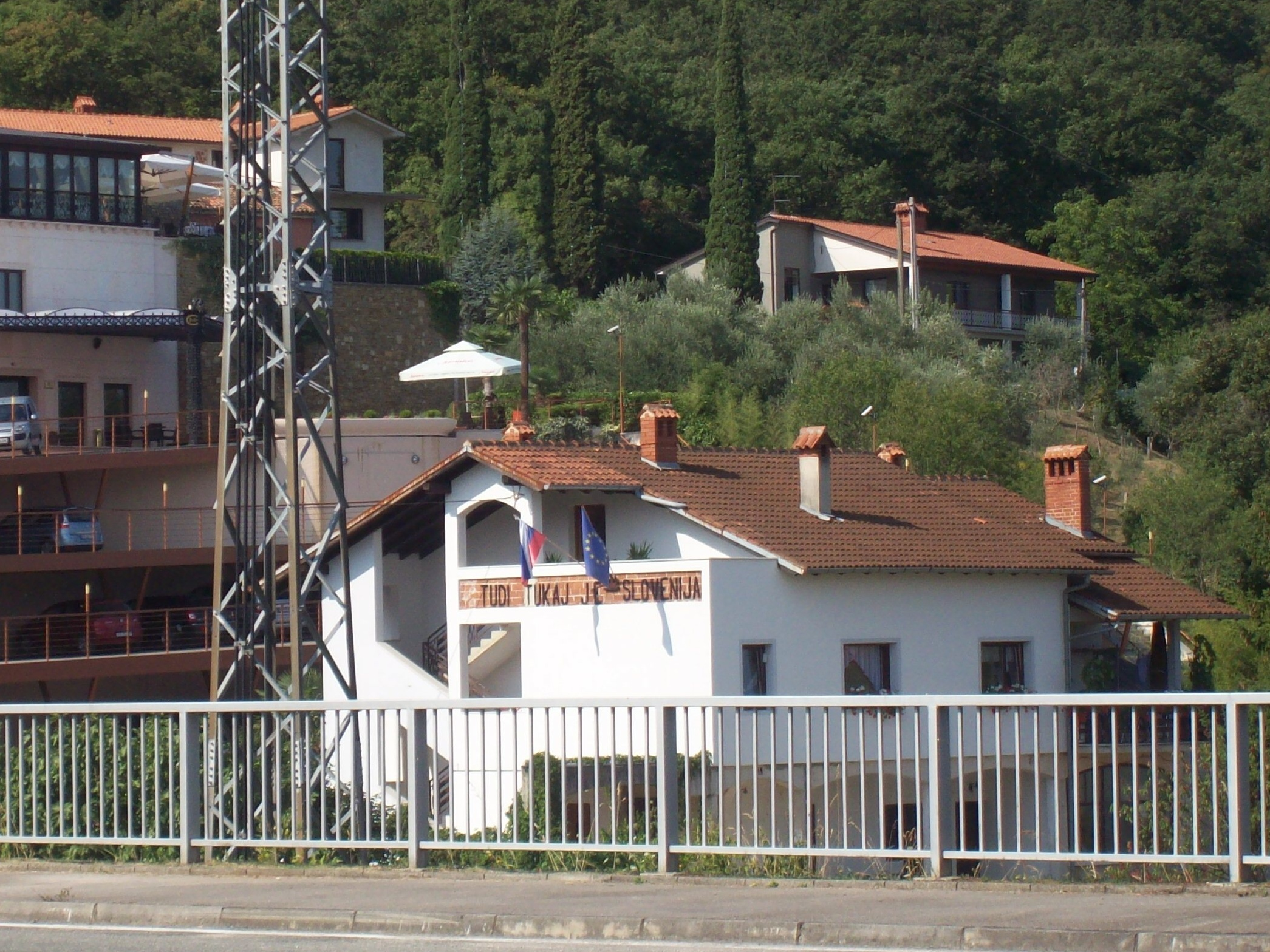 Joško Joras' house